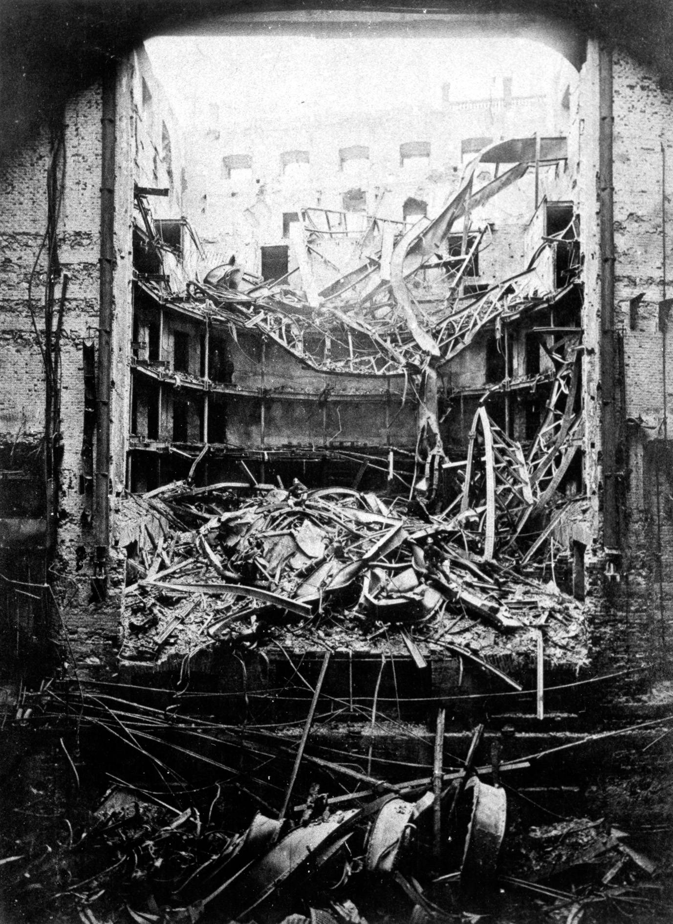 Pohled do interiéru Národní divadla po požáru v roce 1881